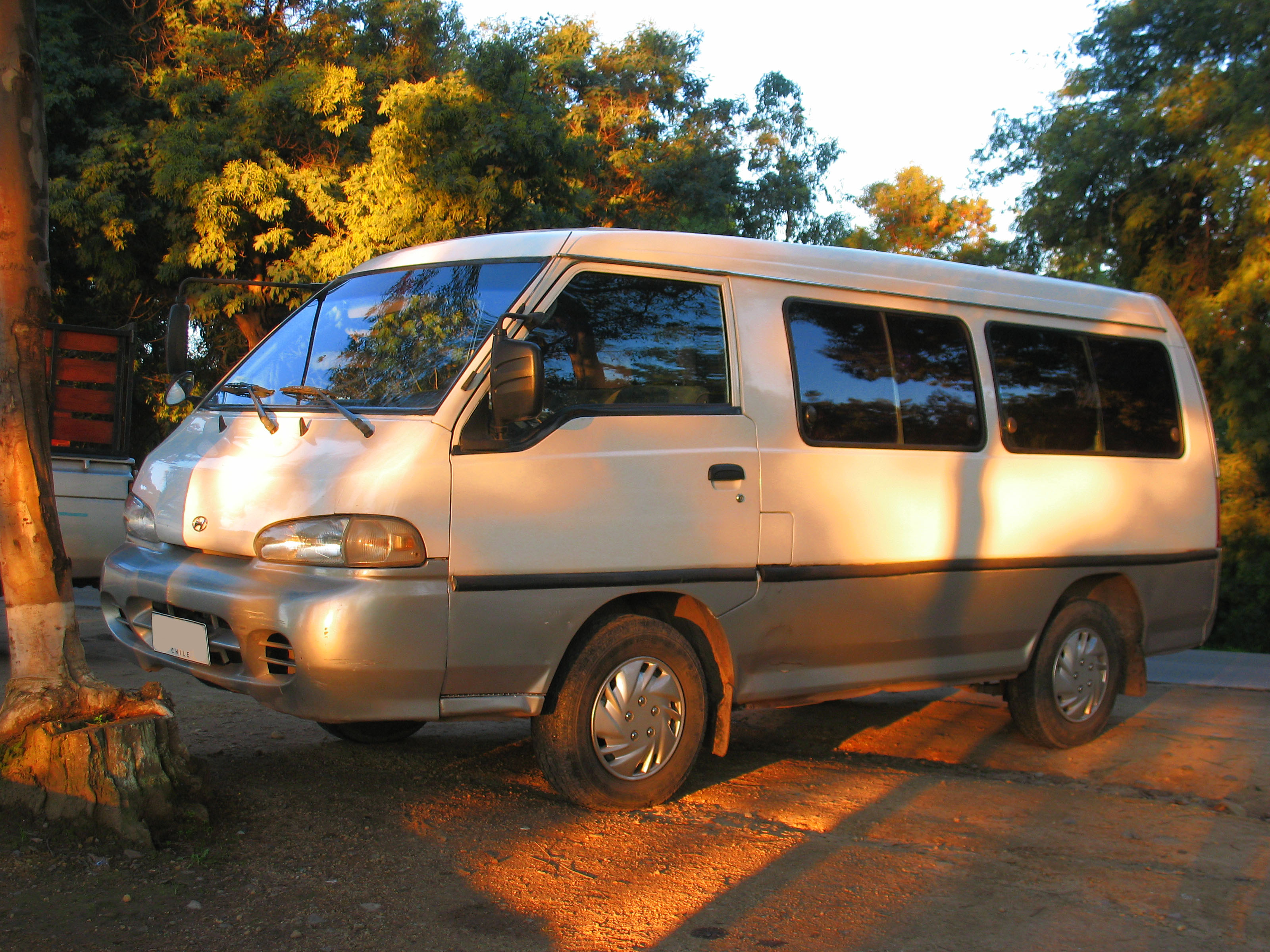 Hyundai H100 Van 1998